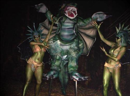 Dragão na Glamazone Fábulas